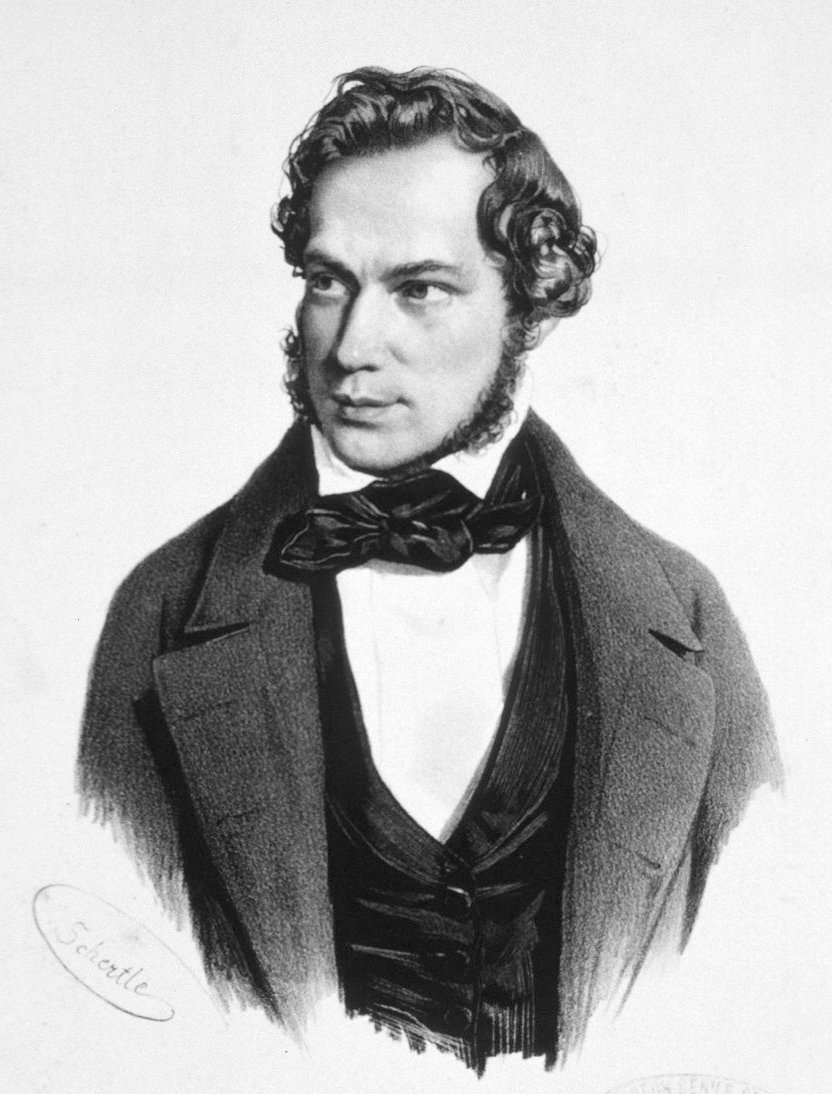 Jakob Henle